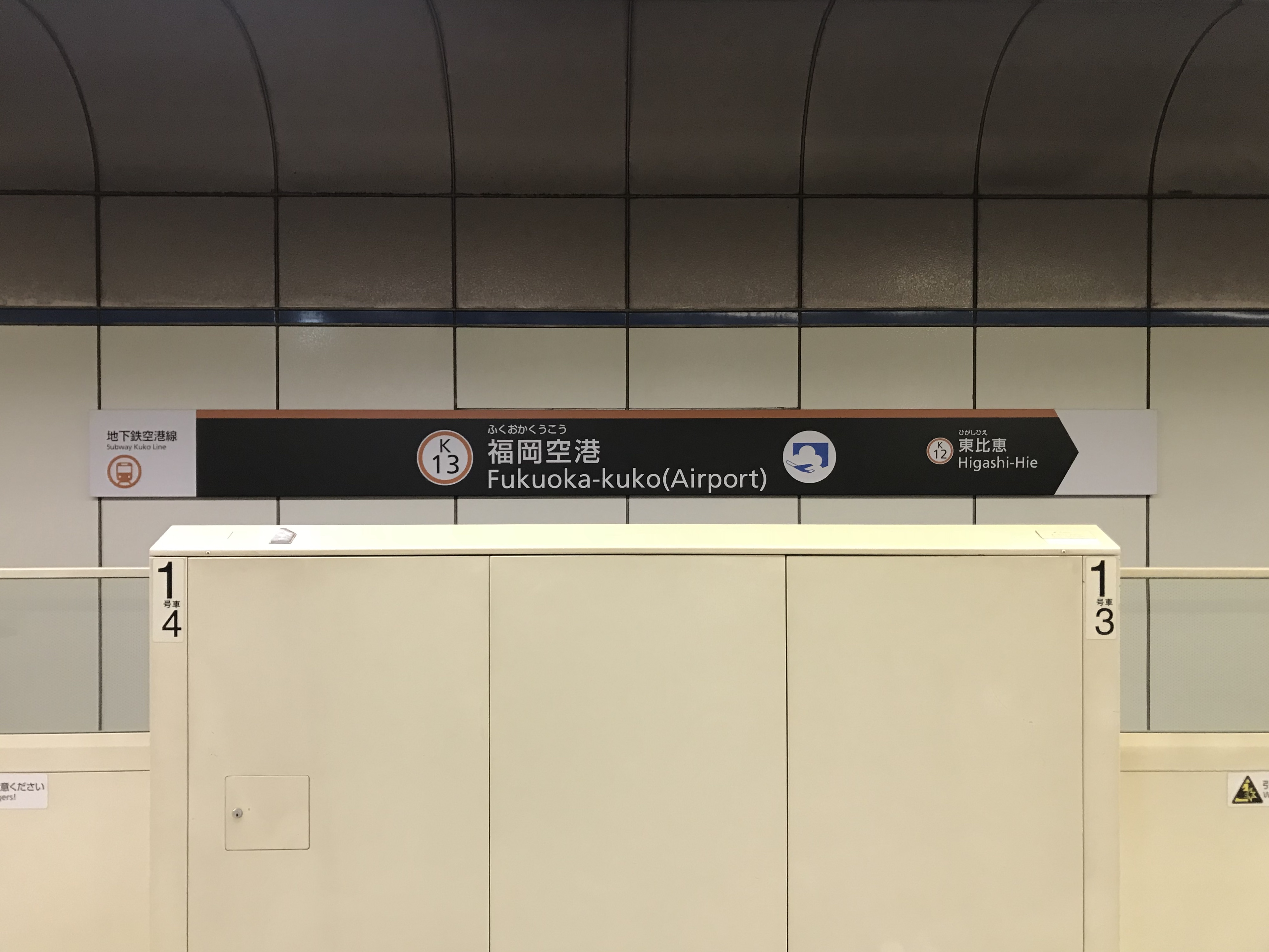 福岡空港駅の駅名標。イラストは雲と飛行機